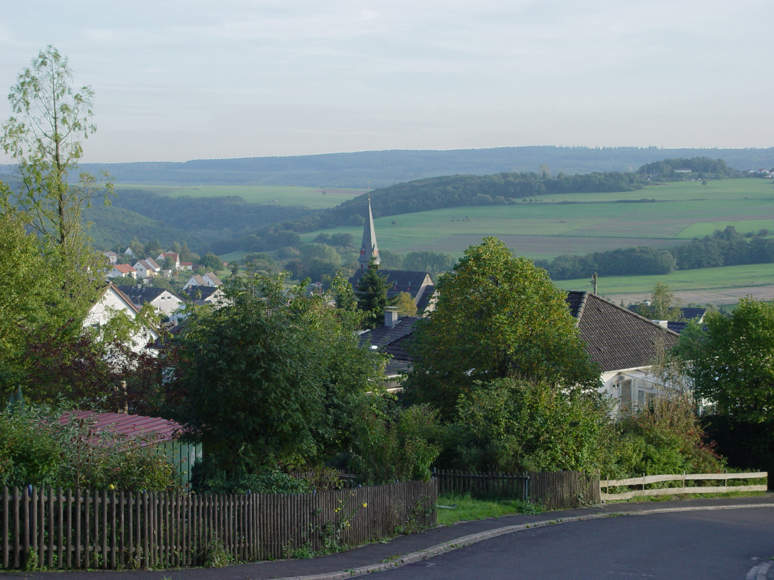 Seibersbach, Kreis Bad Kreuznach